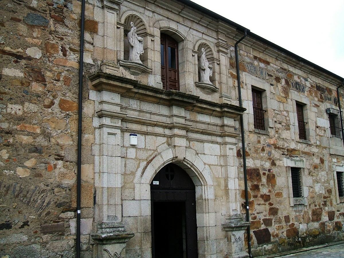 Portería del Monasterio de MM Cistercienses de San Miguel de las Dueñas, provincia de León, España